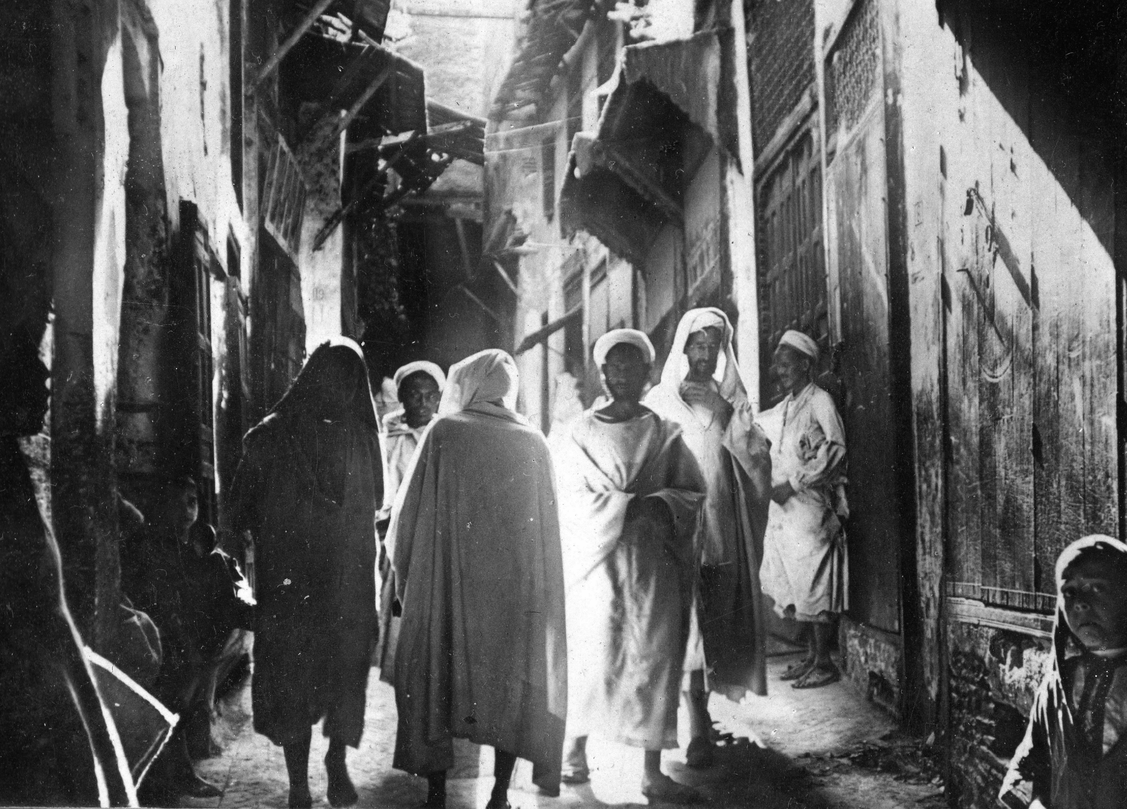 Souk. Location: Morocco, Casablanca Tags: genre painting, backlight, men, exotic Title: Souk.